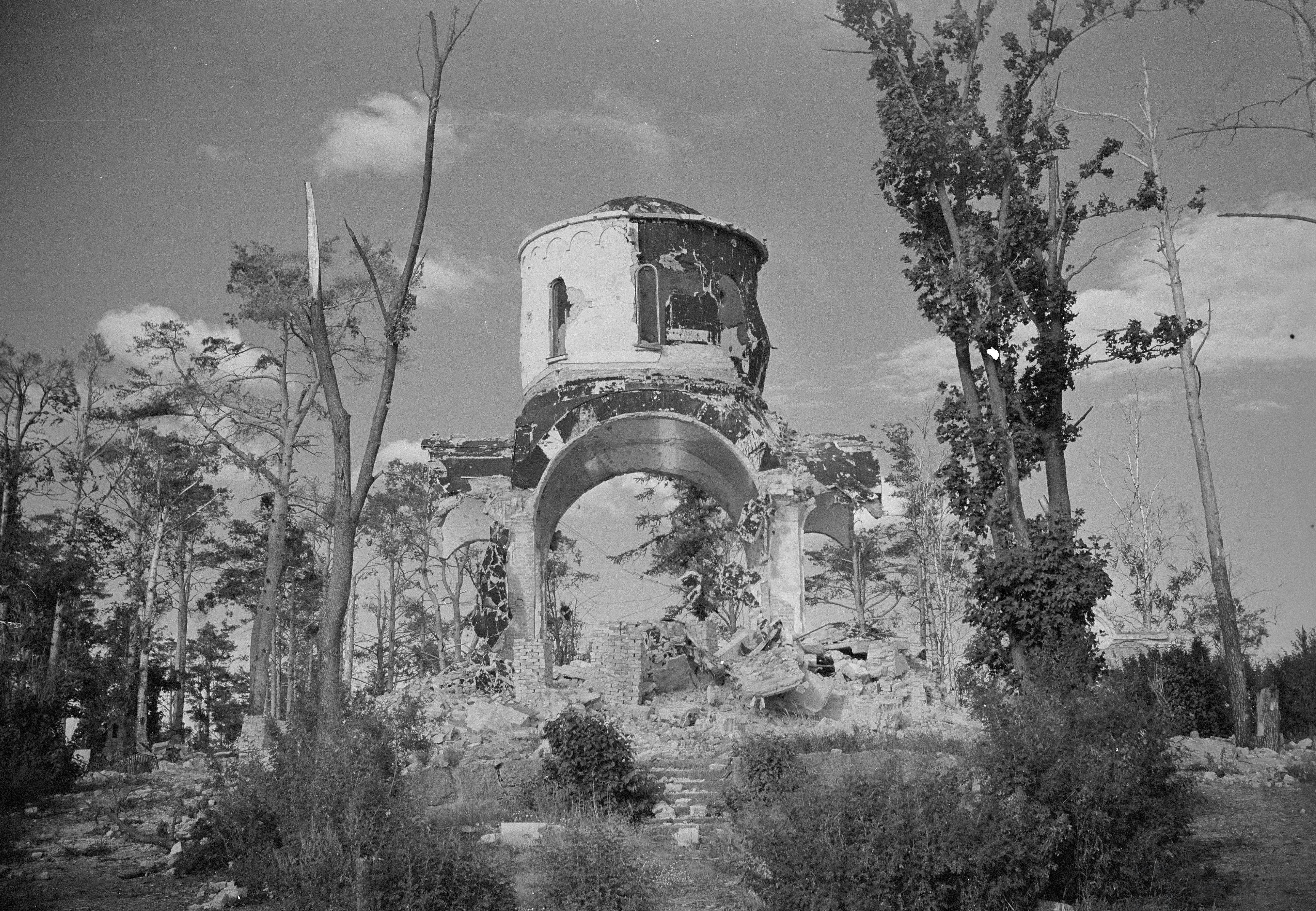 Развалины церкви Всех Святых в Выборге 12 сентября 1941 года